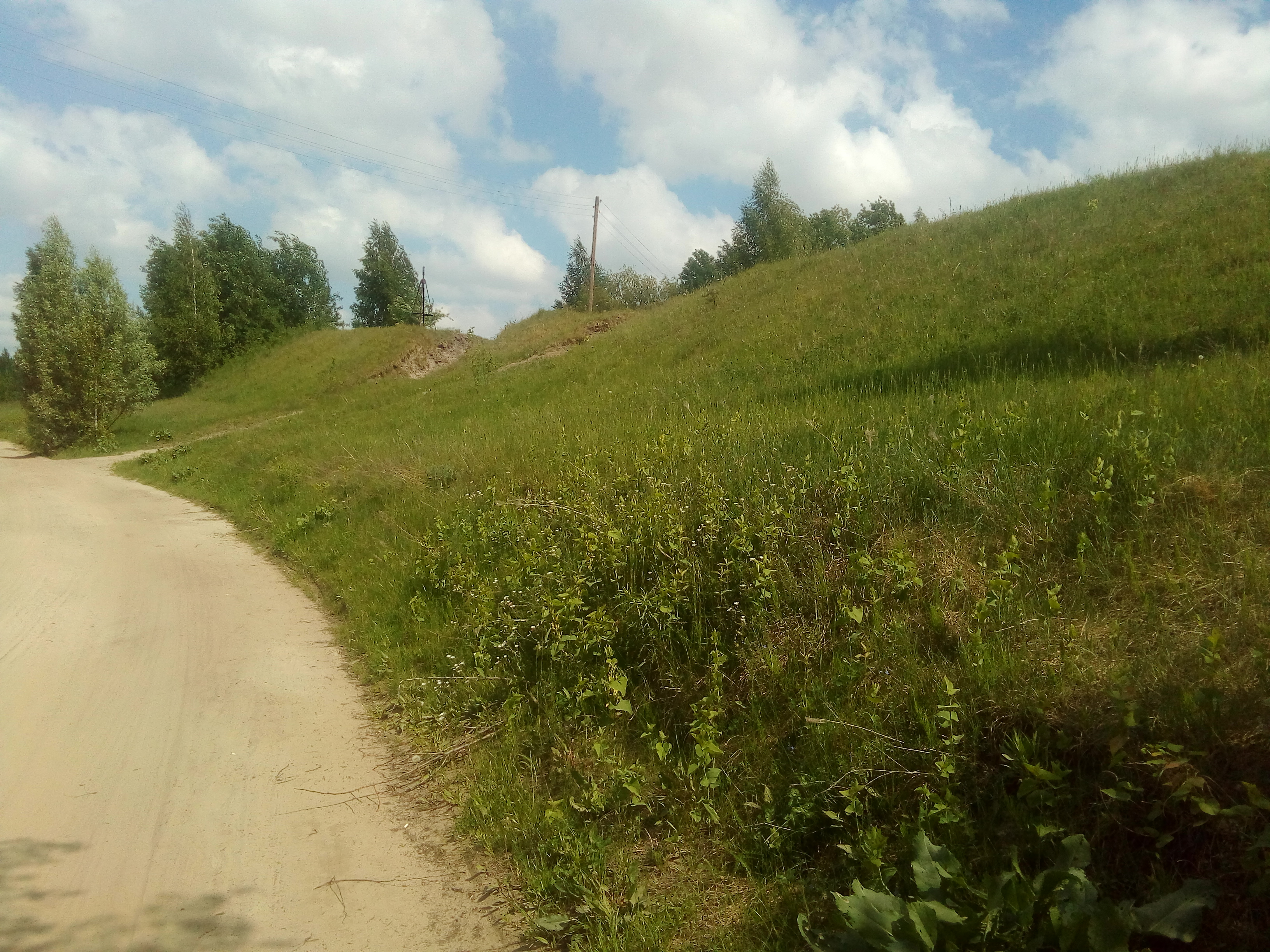 Гарадзішча ранняга жалезнага века "Шведская горка". Схіл гарадзішча.